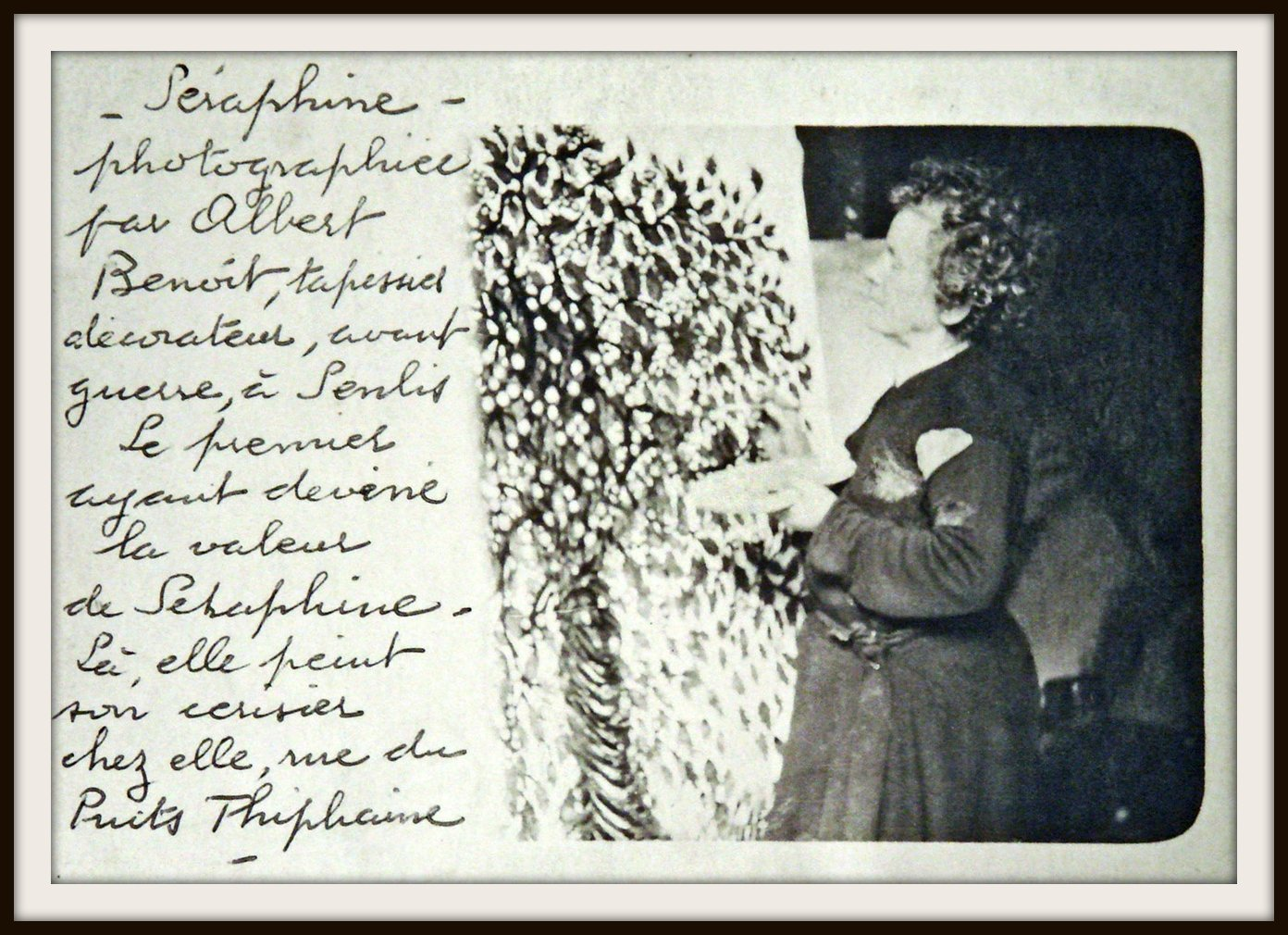 Séraphine de Senlis (1864-1942) en train de peindre exposition de ses peintures au Musée Maillol Les images présentées dans cet album ont été prises par moi-même en visitant l'exposition, parmi la foule, sans flash, ni pied, par simple plaisir esthétique. Elles ont été retravaillées sur Photoshop.